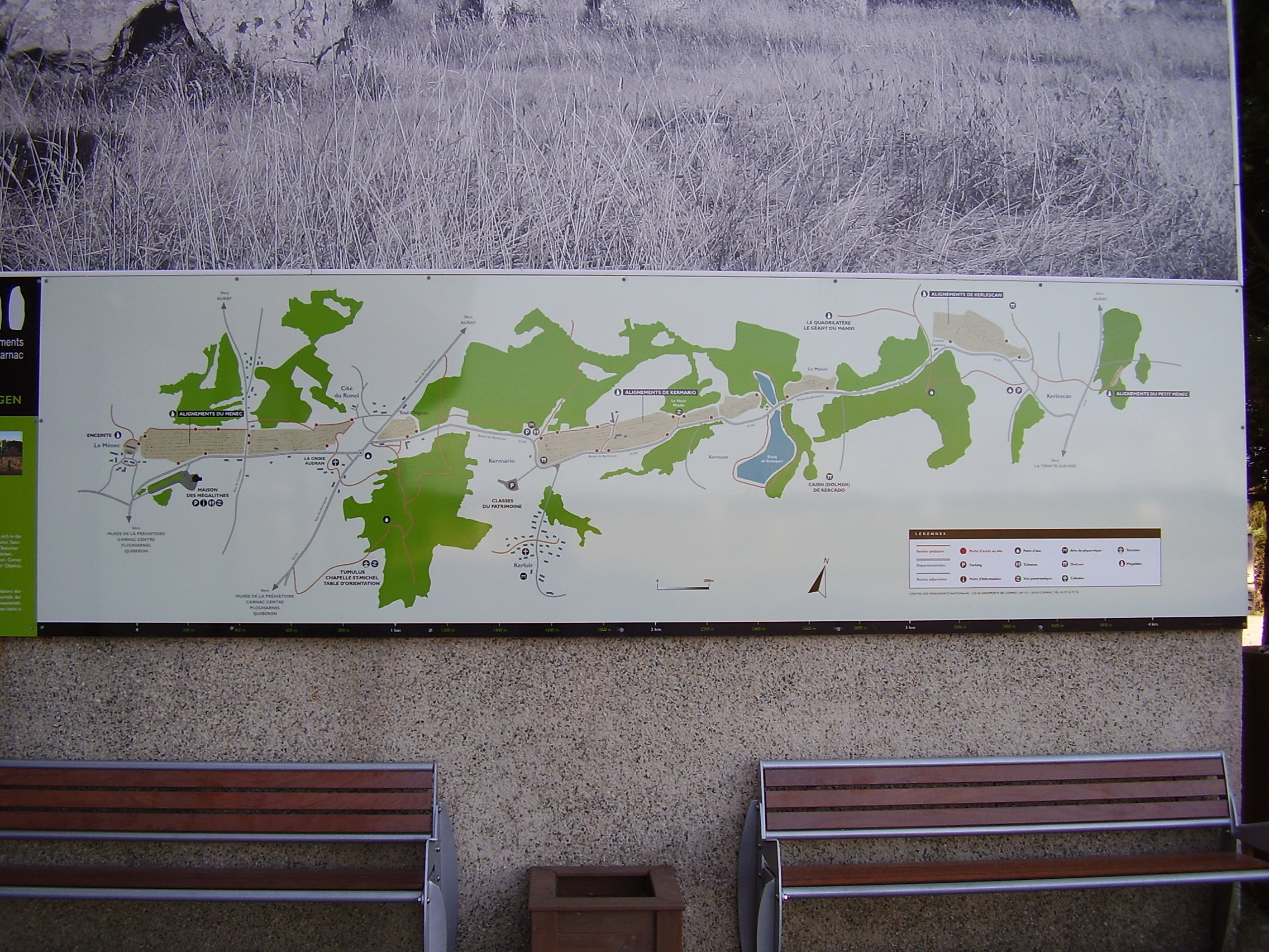 Carnac, France